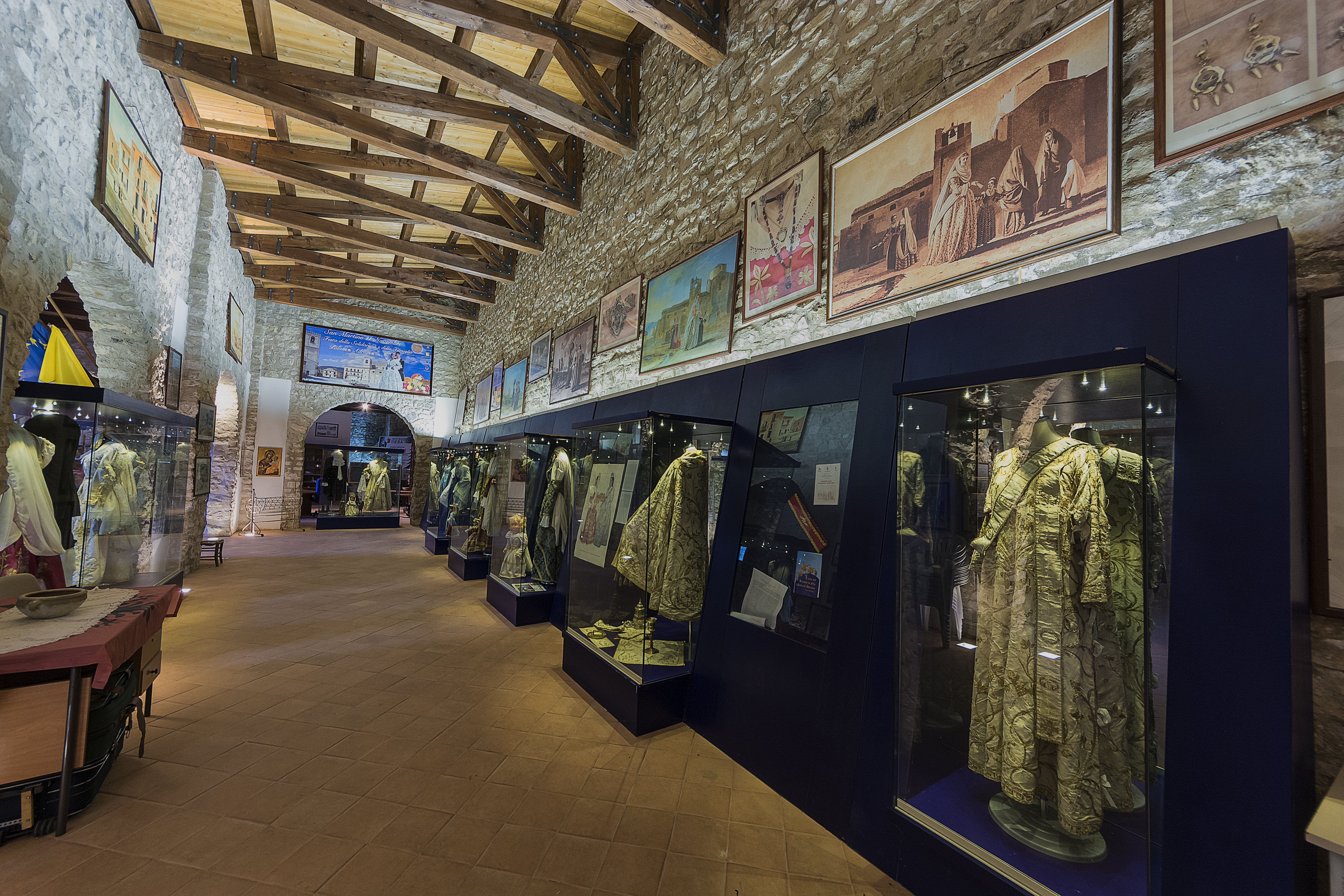 Museo Real Casina This is a photo of a monument which is part of cultural heritage of Italy.